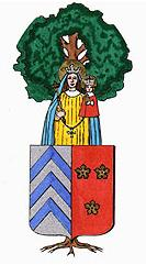 Wapenschild Scherpenheuvel-Zichem